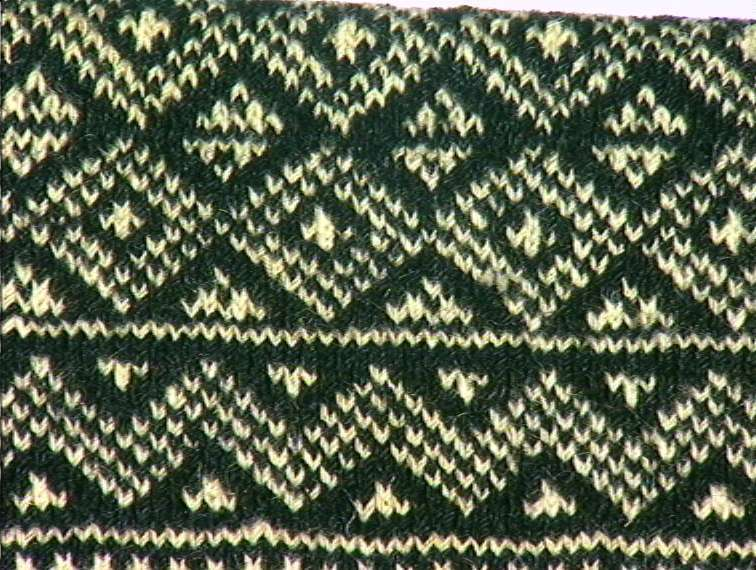 Lusekofte brukt i Bykle i Setesdal, Aust-Agder. Innkjøpt av Norsk Folkemuseum i 1911.